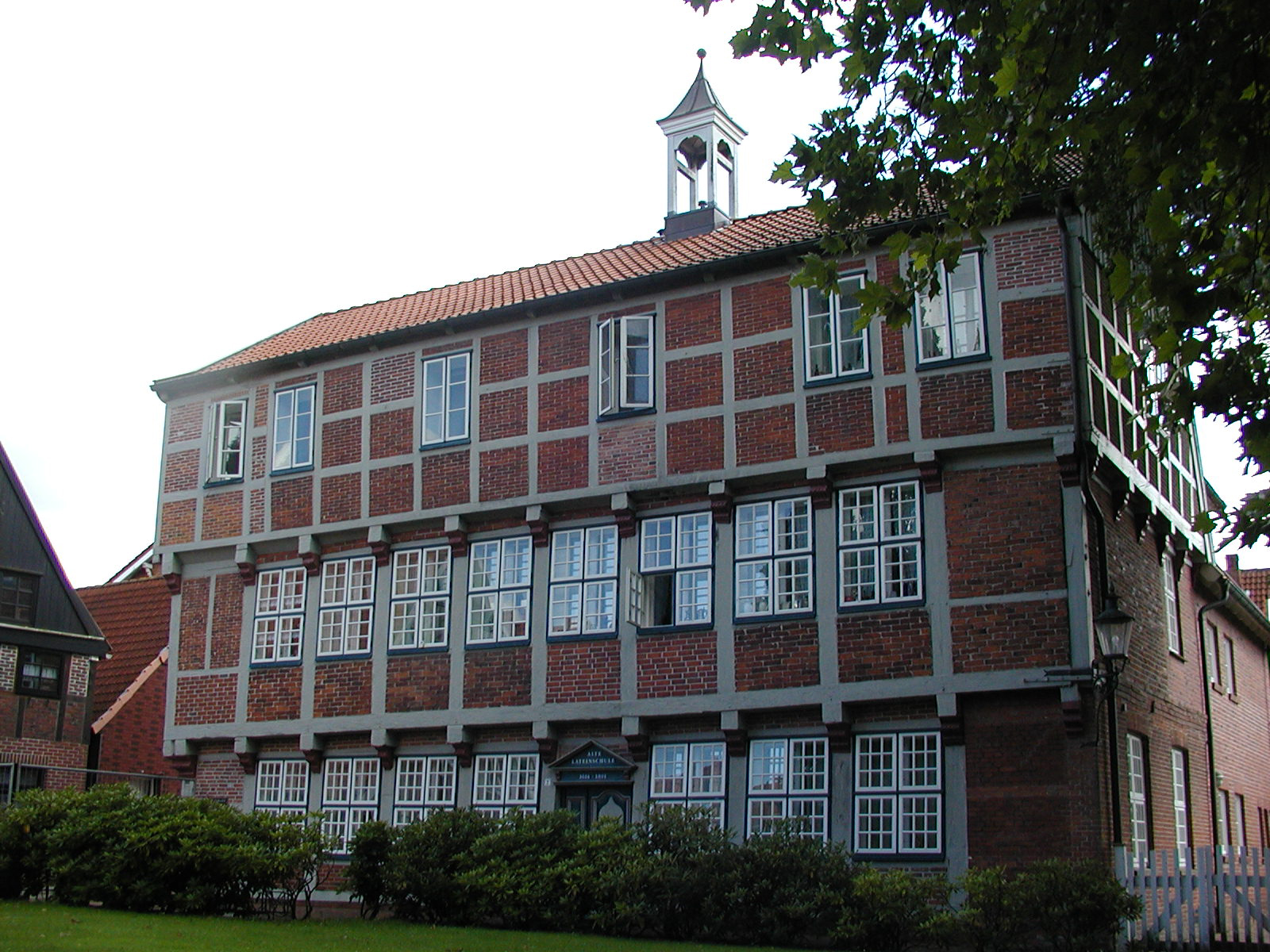 Die Lateinschule